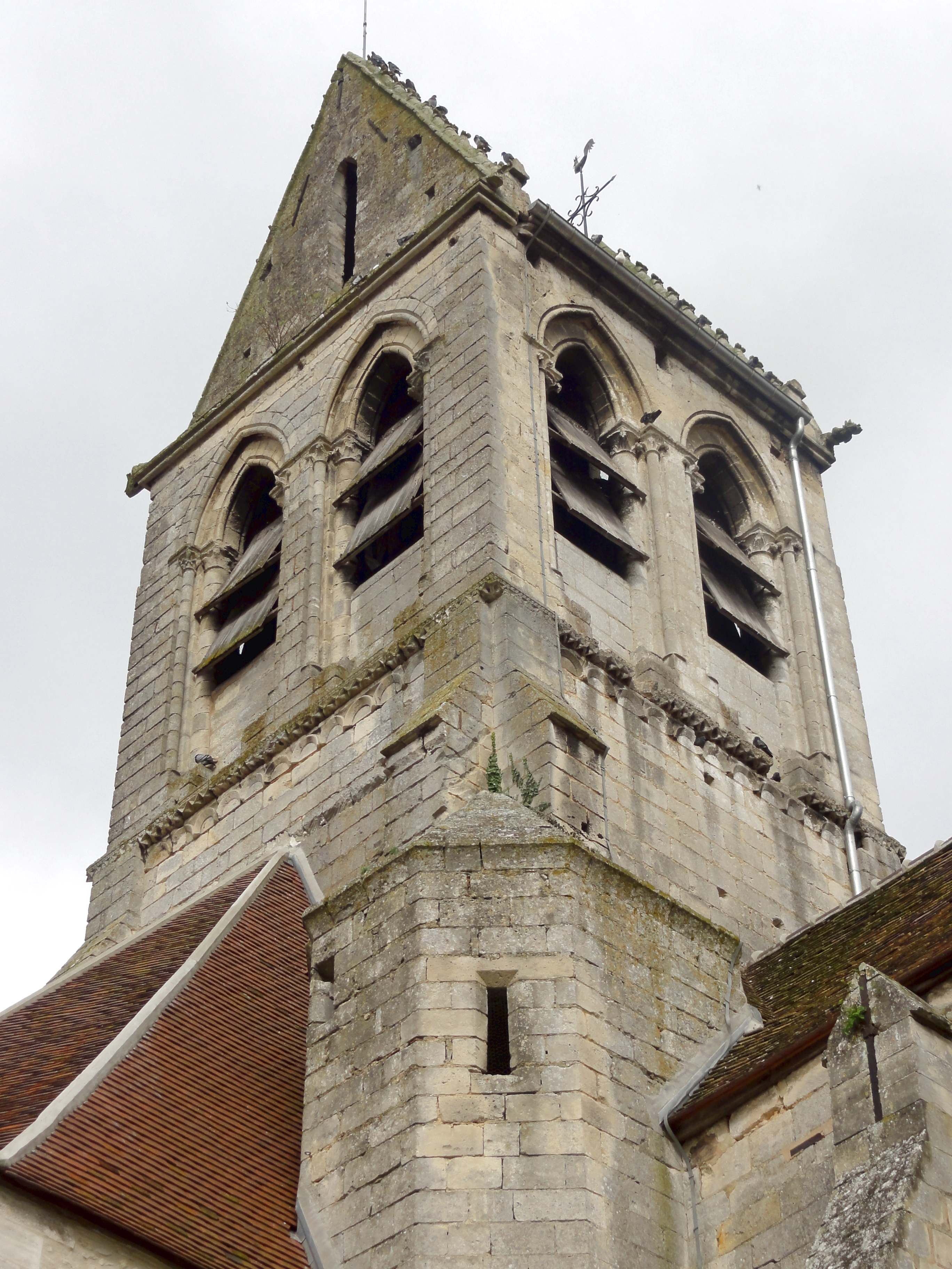 Clocher, vue depuis le sud-est.